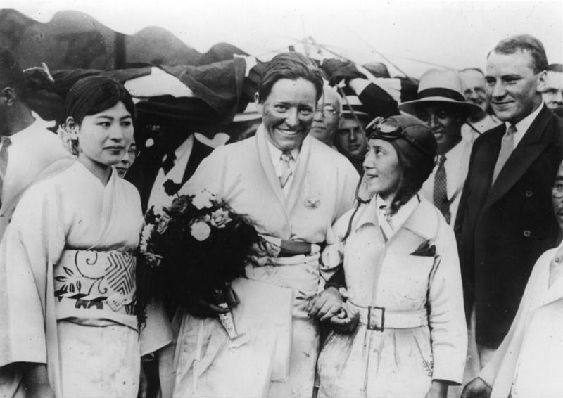 Tokio, Ankunft Marga von Etzdorf ADN/ZB-Archiv Marga von Etzdorf nach Flug Berlin-Tokio 1931 Die 24jährige Marga von Etzdorf (M.) hat im August 1931 ohne jegliche Begleitung die Flugstrecke Berlin - Tokio absolviert. Hier bei dem herzlichen Empfang in Tokio [Japan, Tokio.- Marga von Etzdorf nach ihrer Ankunft mit Blumenstrauß, im Kimono; 29.8.1931 [? Abgebildete Personen: Etzdorf, Marga von: 1907-1933; Kunstfliegerin, Deutschland (GND 12355800X)